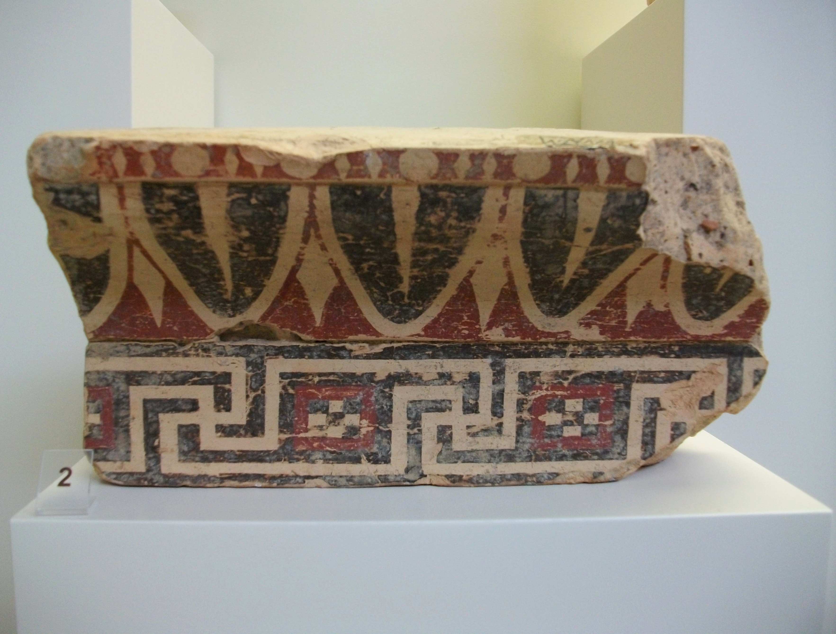 Part d'un cimaci jònic procedent del taller de Fídies a Olímpia, principis del segle IV aC. Museu arqueològic d'Olímpia.